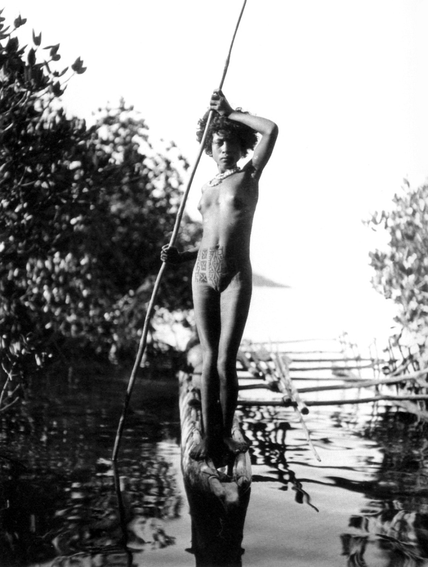 Person aus Neu Guinea